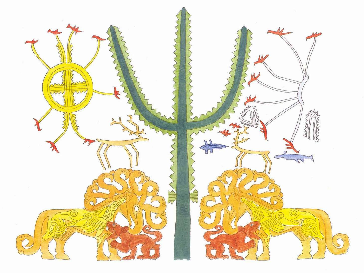 Szibériai művészeti alkotás: egy életfajelenet